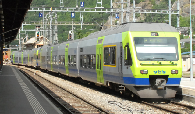 BLS treinstel type Nina RABe 525 015 op 21 juni 2009 te Brig